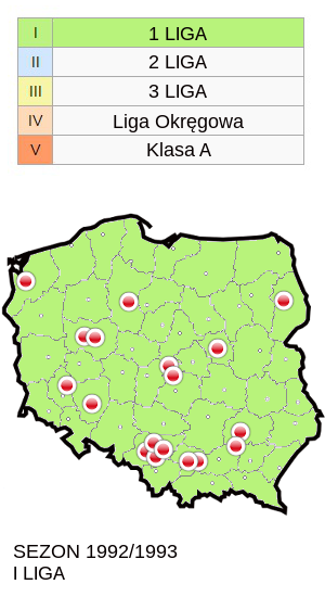 Jagiellonia w sezonie 1992/93 mapa